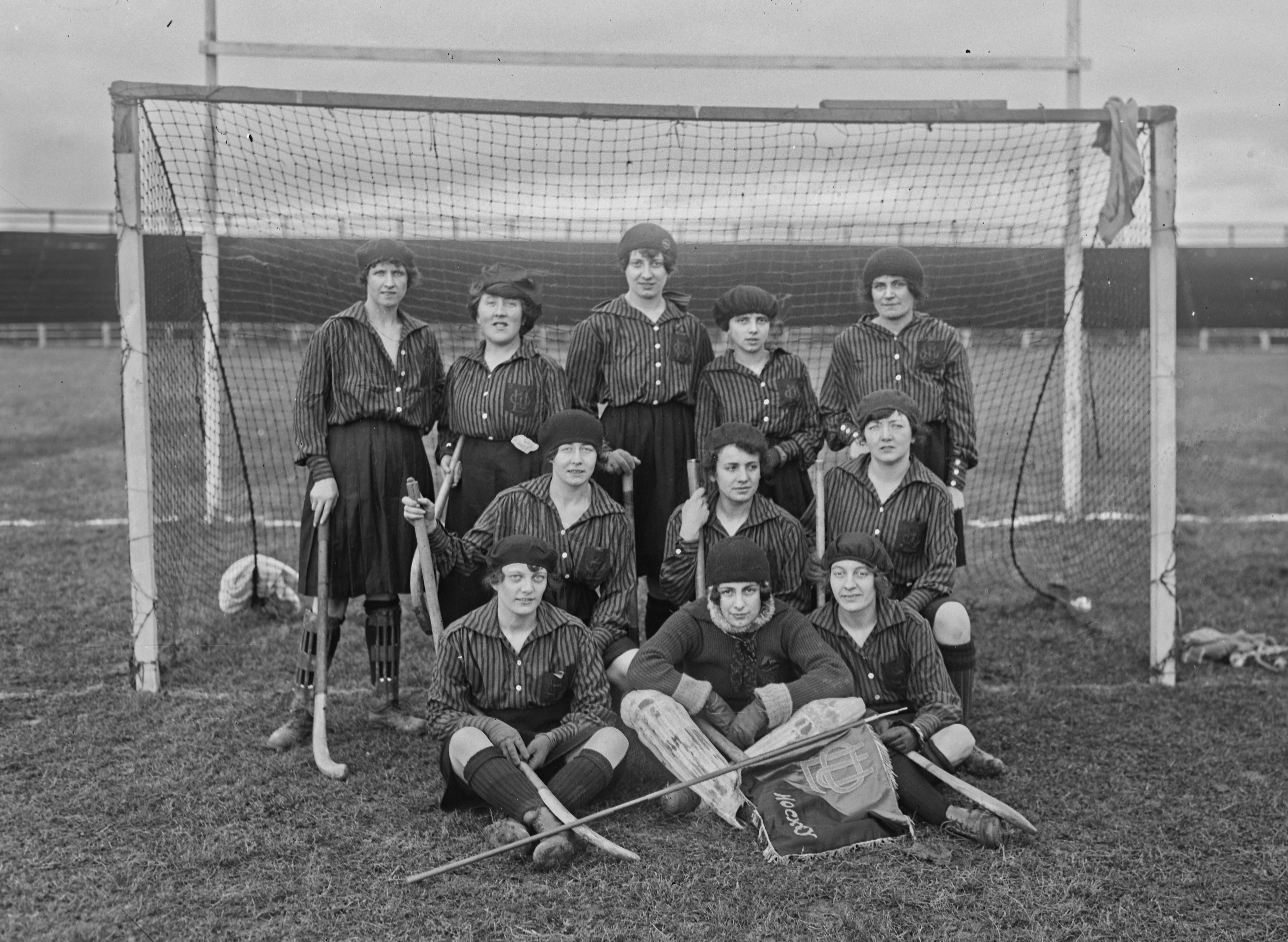 Hockey sur gazon à Colombes, 1/1/21, équipe féminine du Lyon Olympique Universitaire.